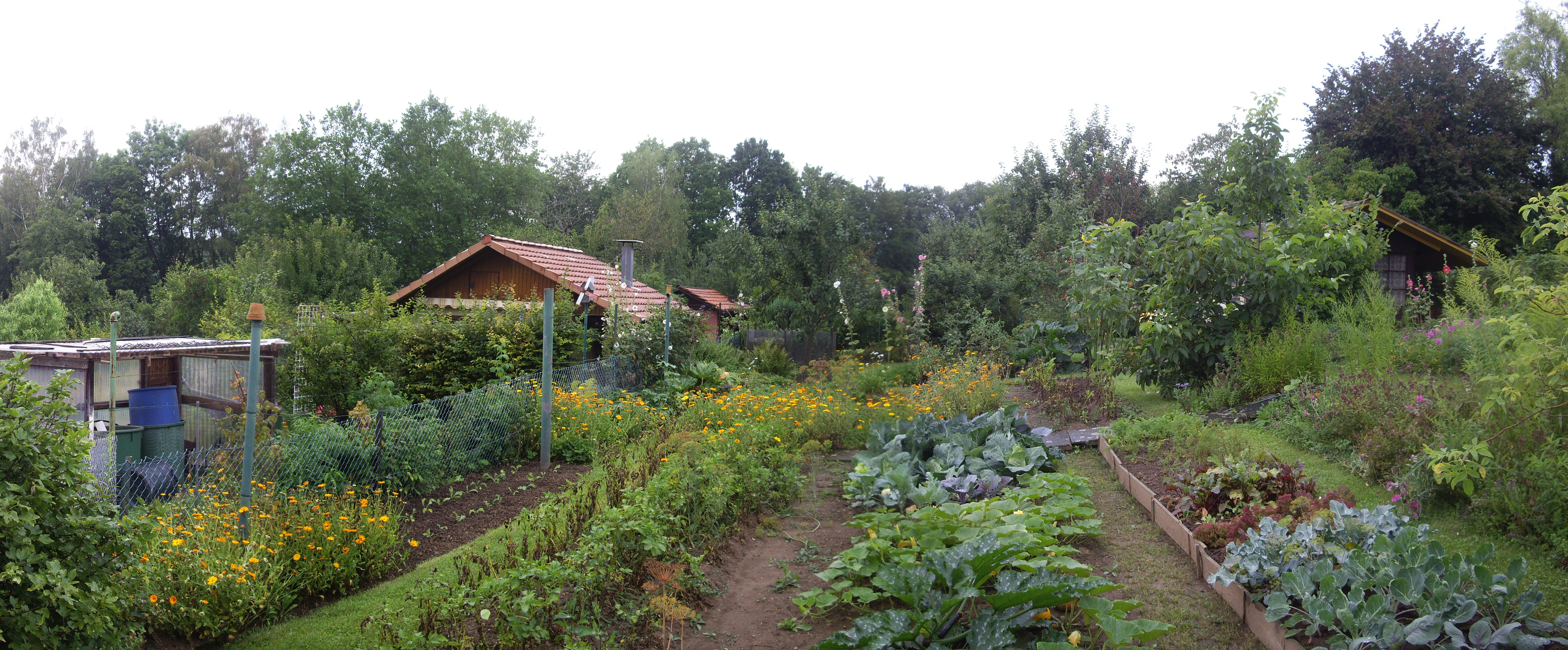 Kleingartenkolonie Am Rohns, Göttingen. Gartenlauben im Nordbereich nahe Habichtsweg, Blick nach Nordwesten, im Hintergrund der Wald auf dem IWF-Grundstück.